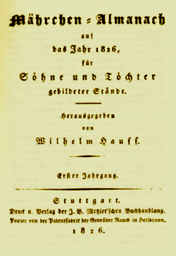 Titelblatt der Erstausgabe von Wilhelm Hauffs Mährchen-Almanach auf das Jahr 1826.